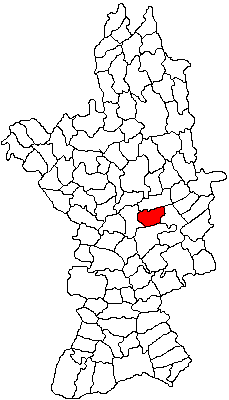 Categorie:Hărţi ale judeţului Olt